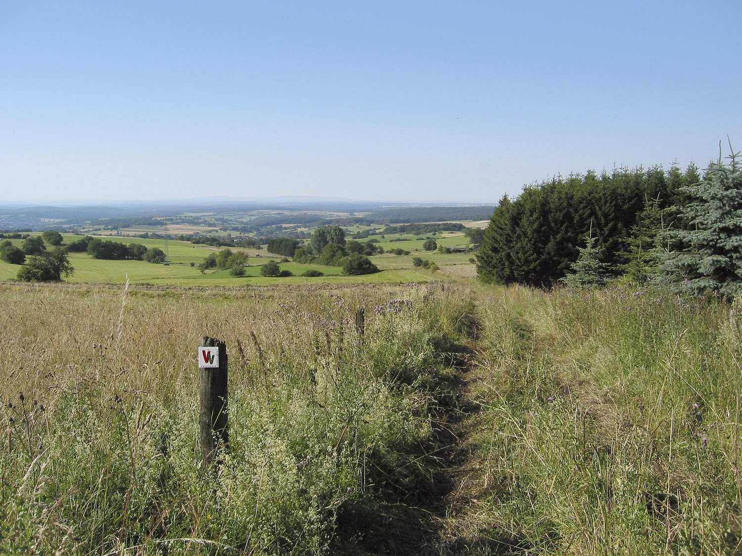 Vulkanring Vogelsberg - herrliche Aussichten von den Flanken des Vulkans